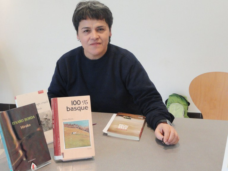 Itxaro Borda idazlea. Argazkia: EKE (Pantxika Maitia).